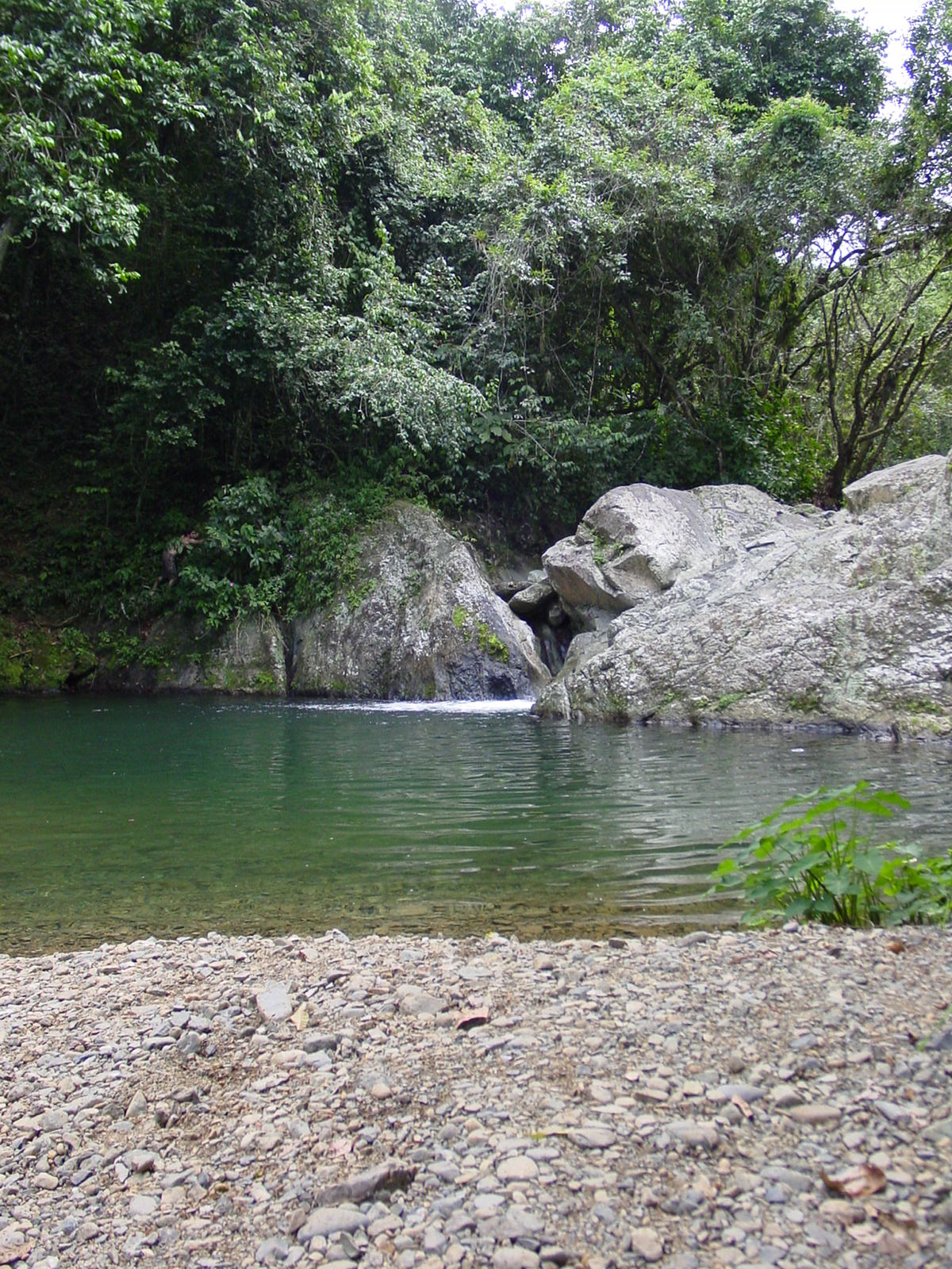 Charco Mangó, Adjuntas